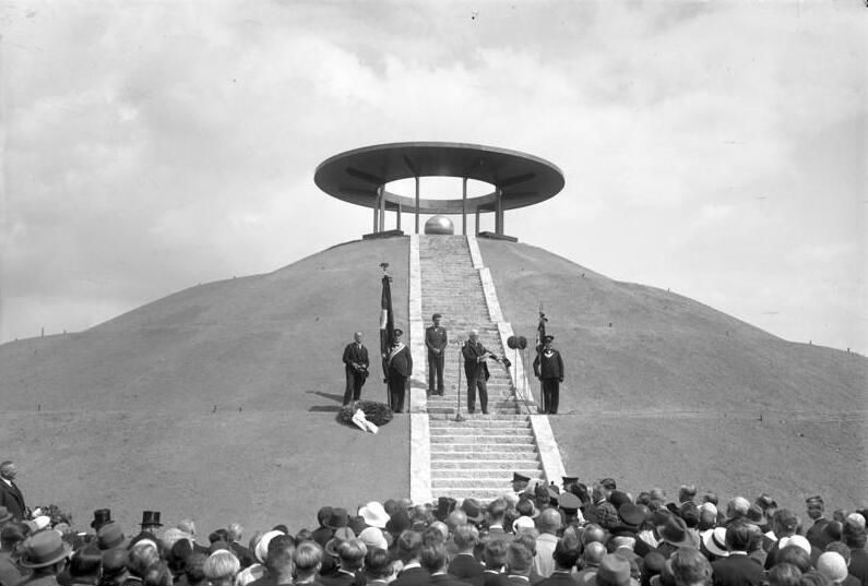 Die Feierliche Enthüllung des neuen Lilienthal-Denkmals auf dem historischen Uebungshügel Otto Lilienthals in Berlin-Lichterfelde an seinem 36. Todestage ! Geheimrat Prof. Schütte, der bekannte deutsche Luftschiff-Konstrukteur, hält am Fusse des Denkmals die Gedenkrede.